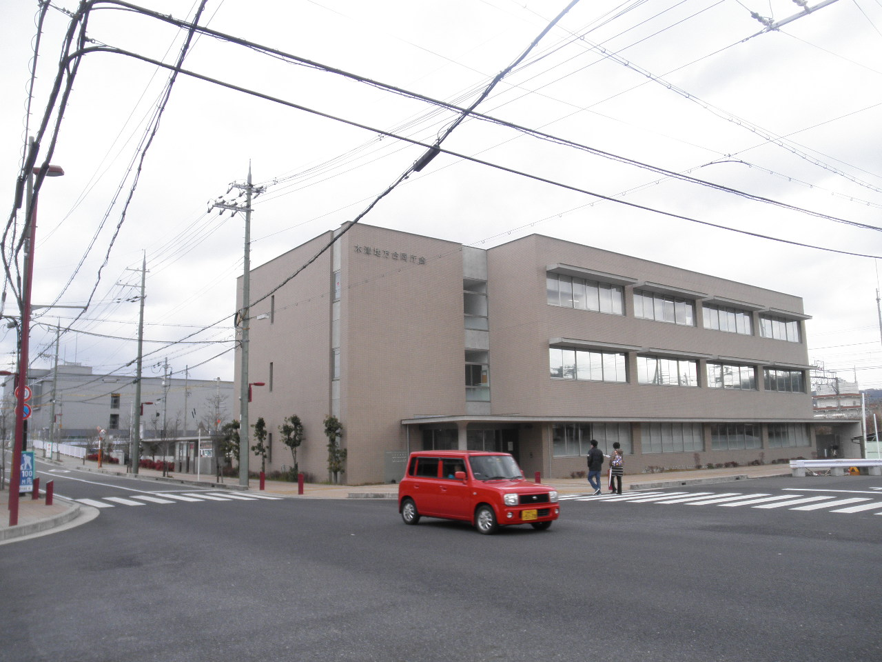 木津地方合同庁舎。京都田辺公共職業安定所木津出張所、京都地方法務局木津出張所、木津区検察庁が入居。